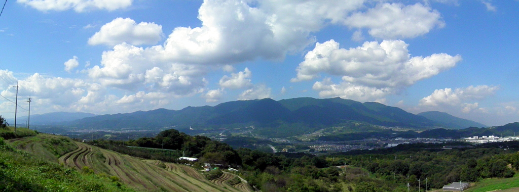 金剛山地（奈良県五條市）